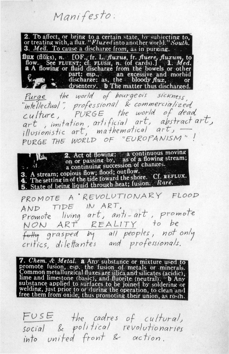 Fluxus